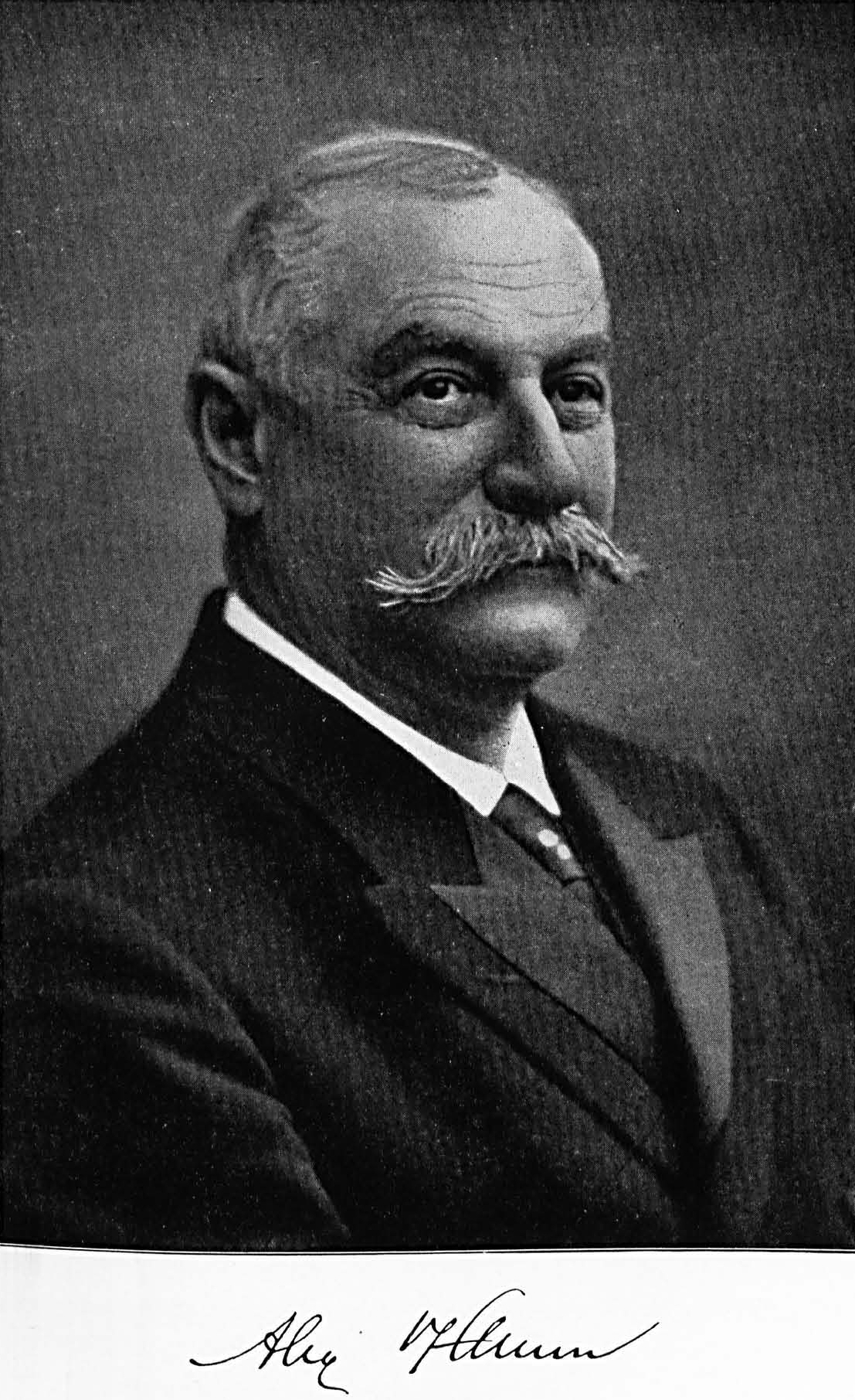 Porträt des Bankiers Alexander Pflaum (1839-1911).